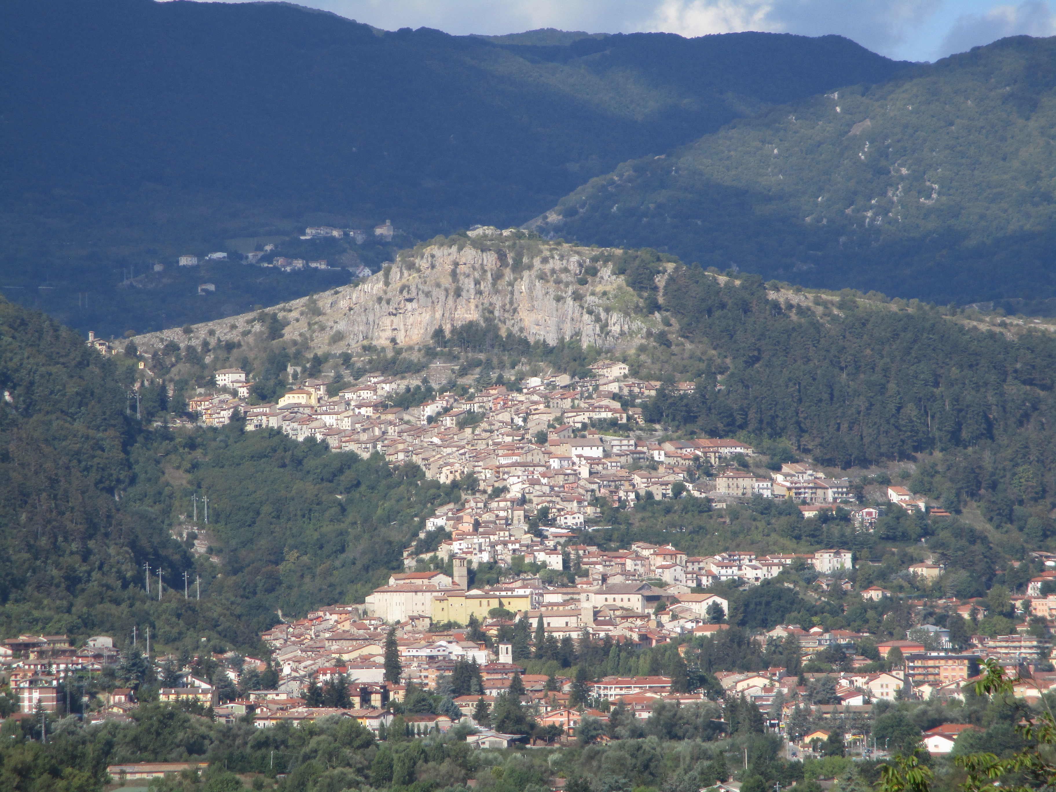 Veduta di Tagliacozzo